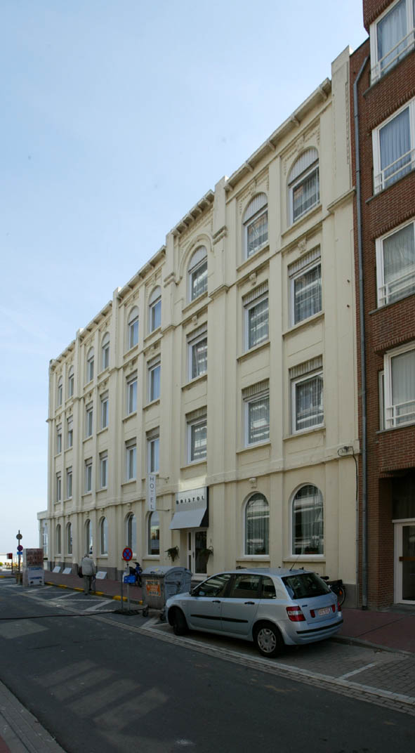 Louis Parentstraat 1